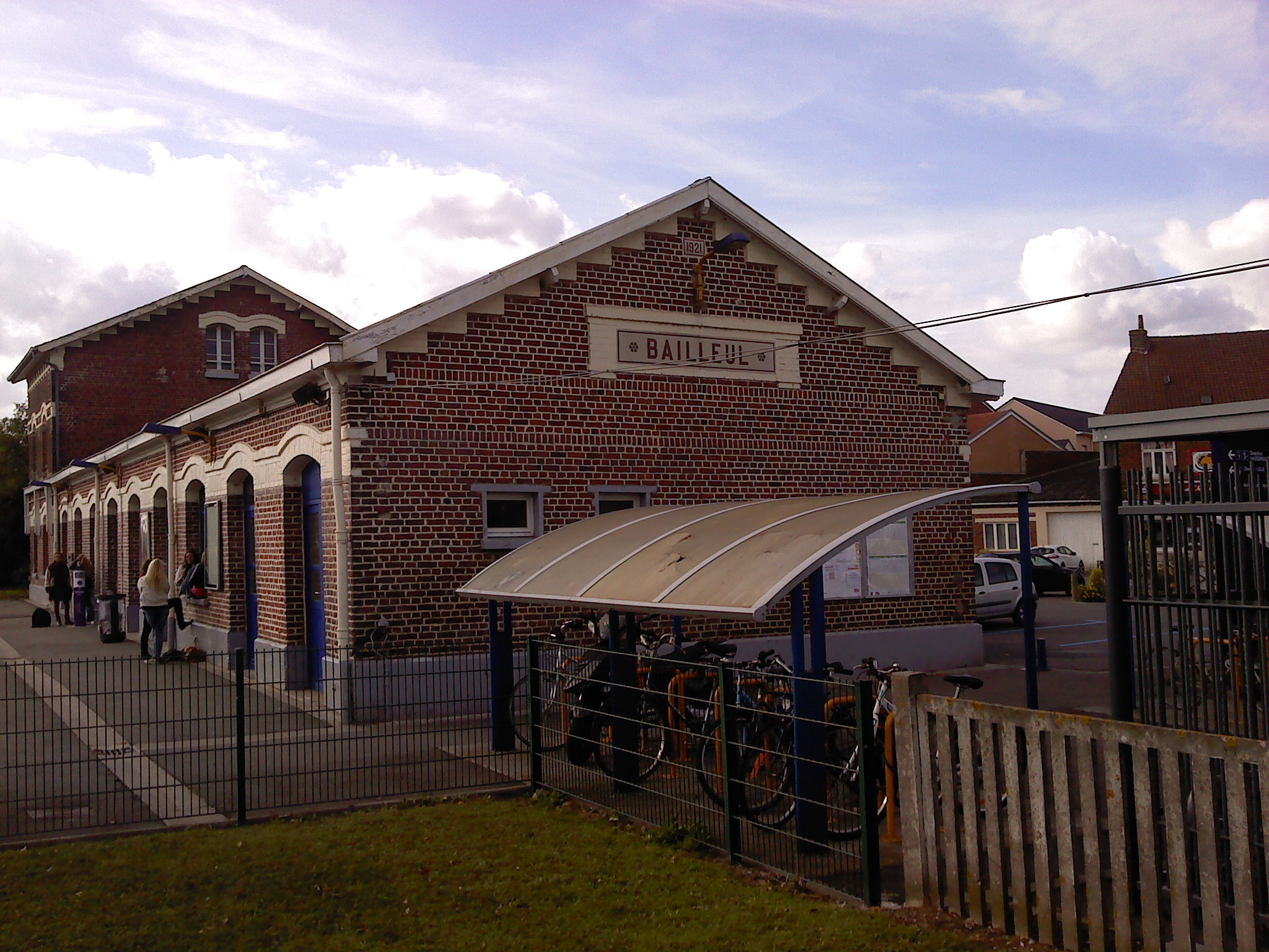 Gare de Bailleul